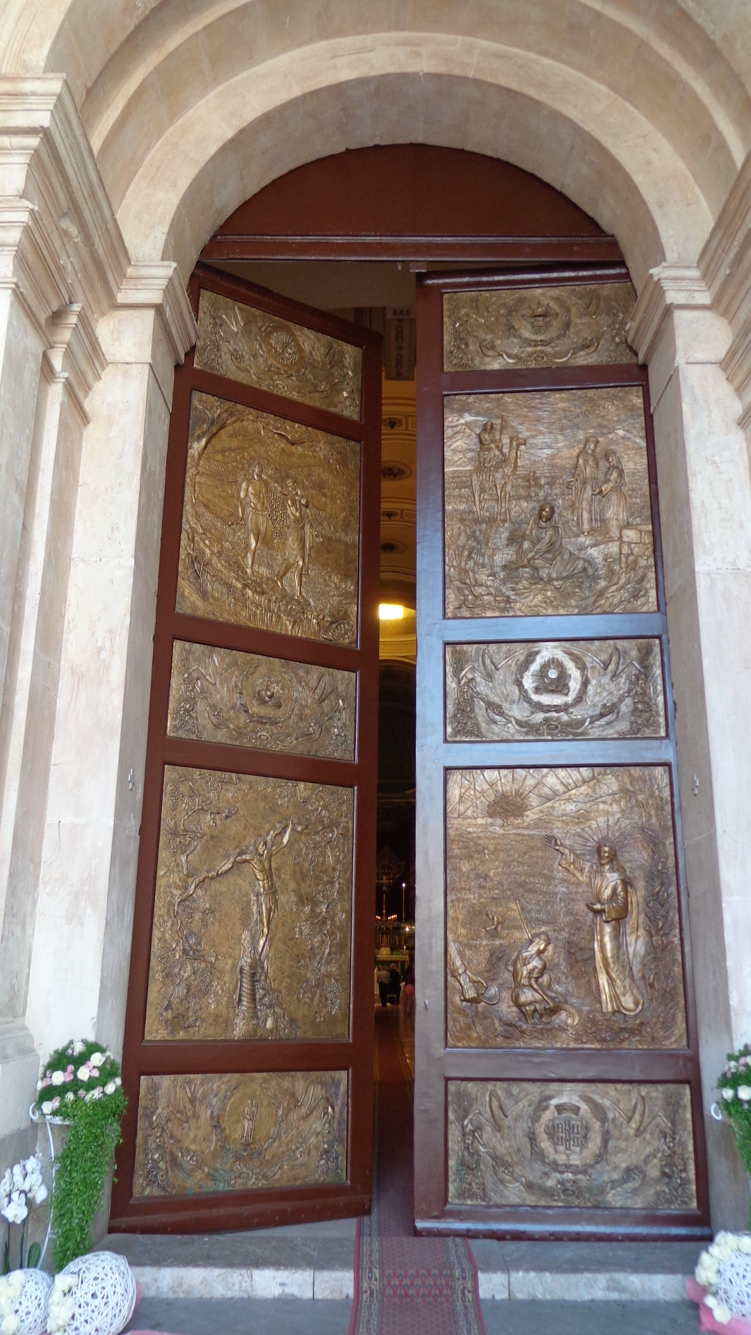 Portale